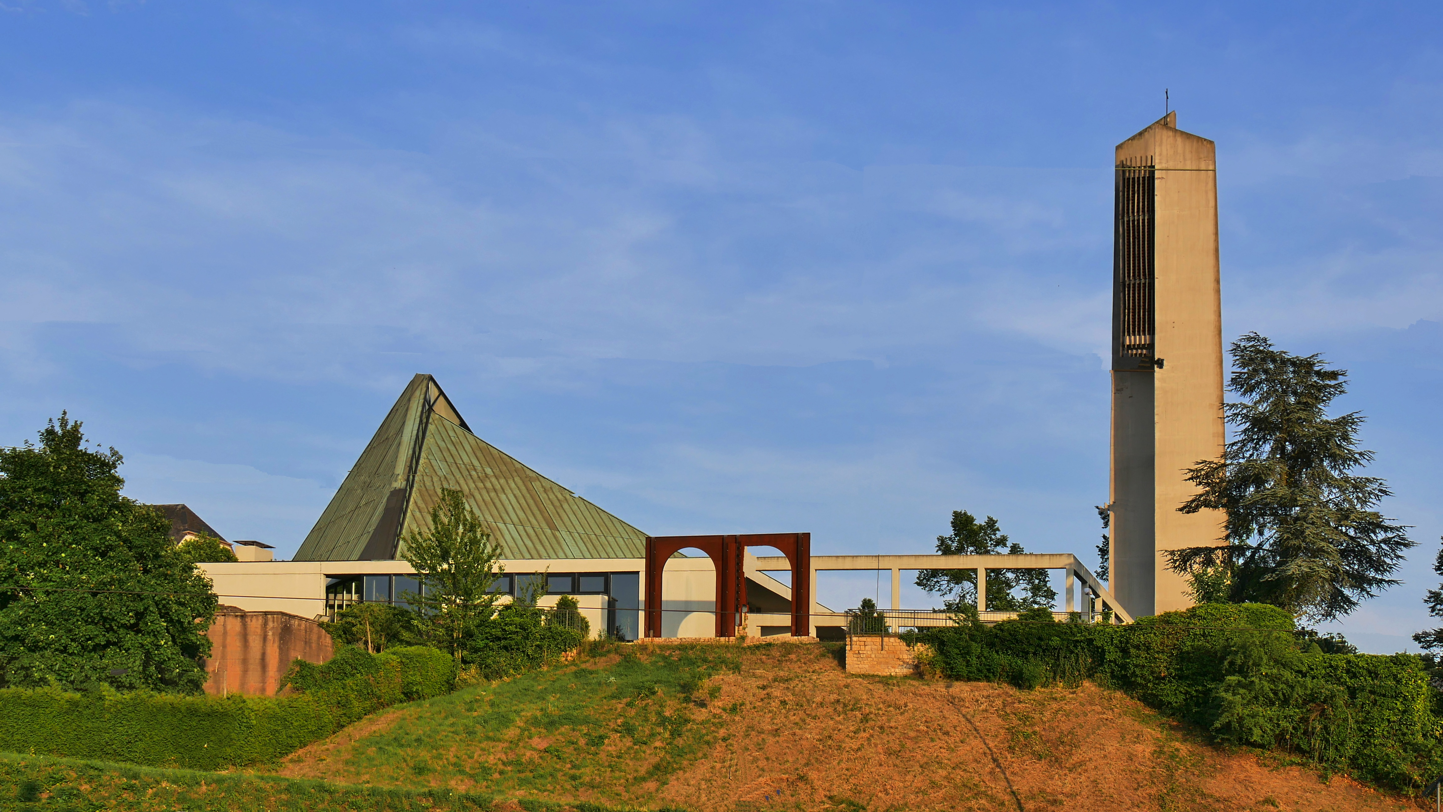 Katholische Kirche St. Nikolaus in Konz (an der Mosel)